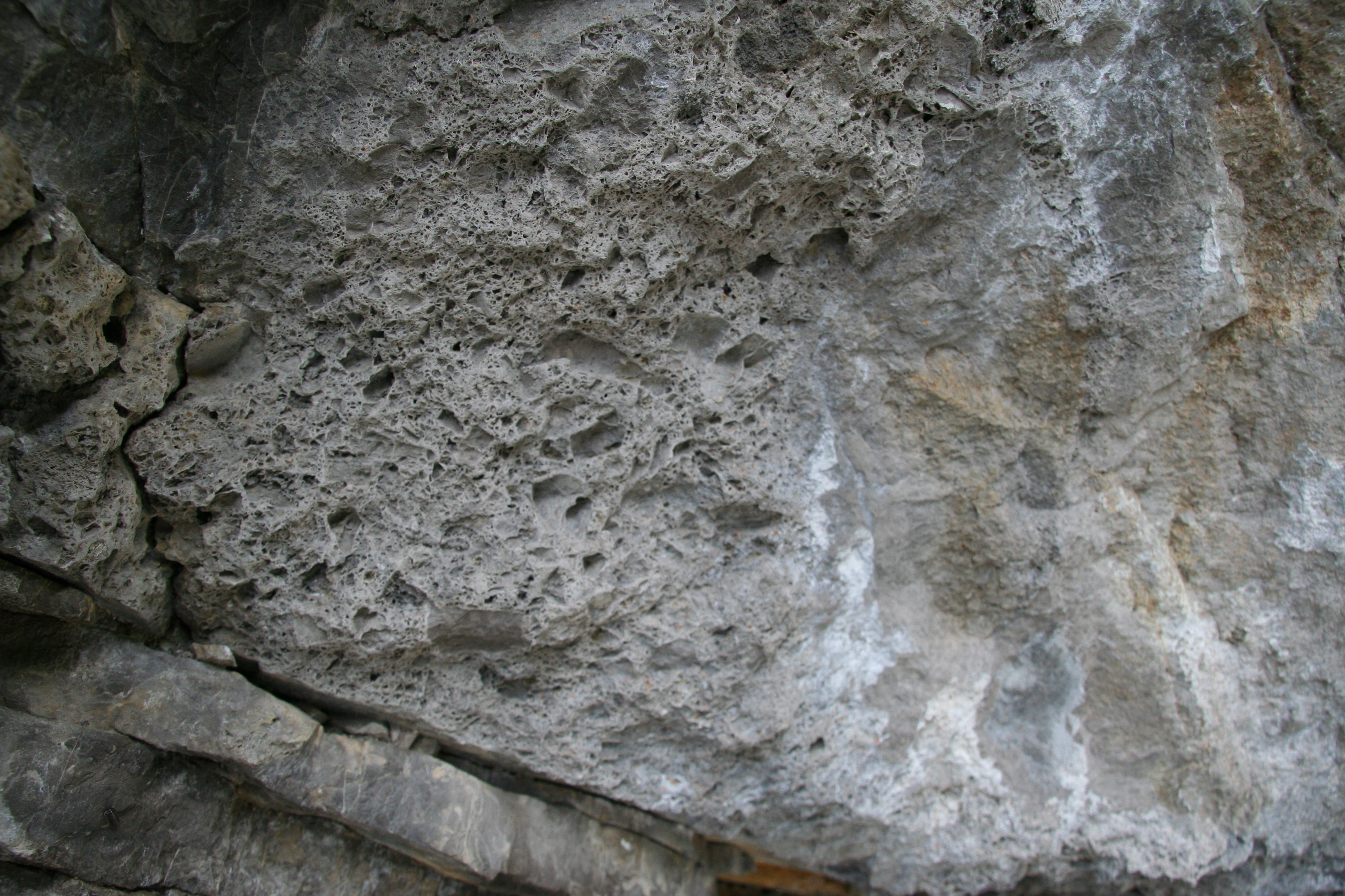 Rauwacke oder Zellenkalk in den Raibler Schichten der Ehnbachklamm bei Zirl in Tirol